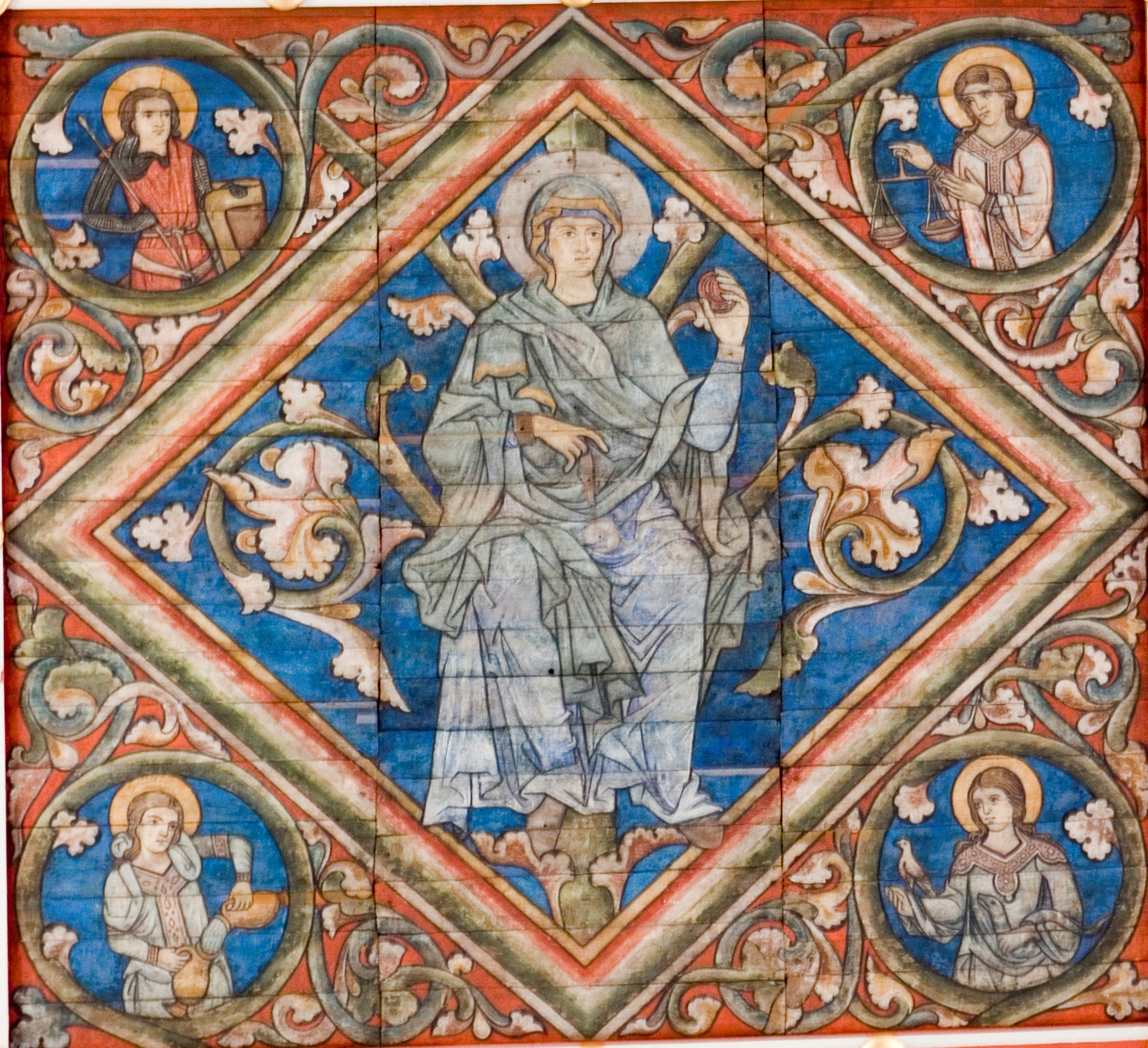 Holzdecke (Detail:Maria) in St. Michael